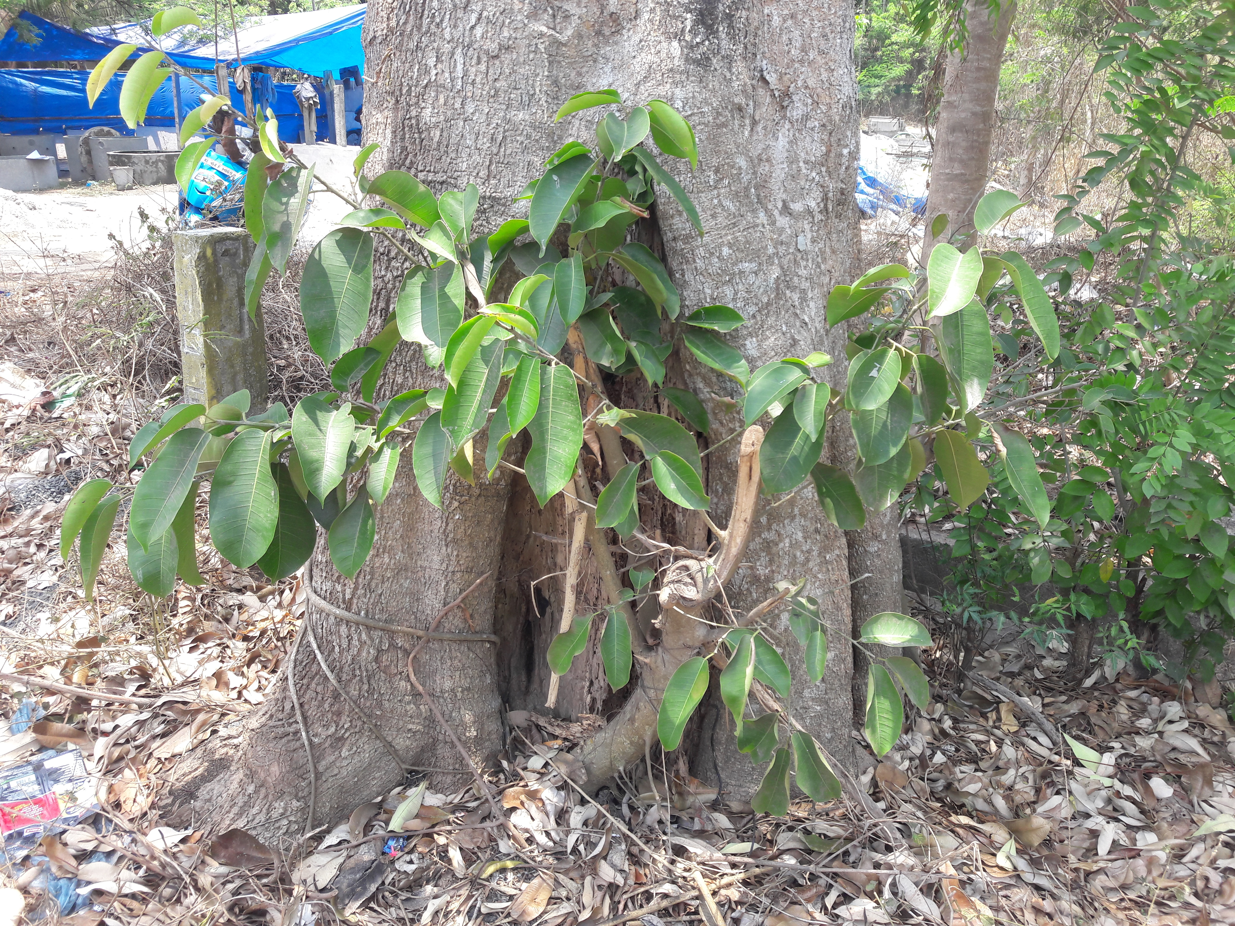 ഏഴിലംപാല മരത്തിനോട് ചേര്‍ന്ന് ഒരു കൊയലി മരം വളരുന്നു. Indian Bat tree / Indian Bat fig ശാസ്ത്രീയ നാമം Ficus amplissima കുടുംബംMoraceae.